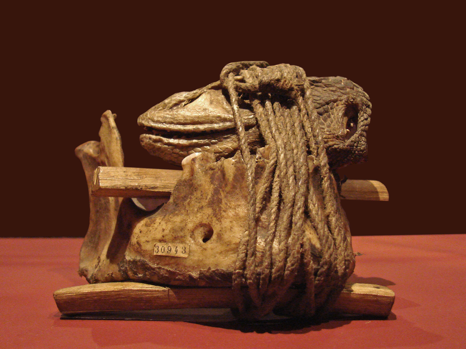 Bo (fétiche africain) Bénin Fétiche saisi sur une guerrière africaine tuée par l'armée française lors de la bataille à Cotonou le 4 mars 1890 l'opposant aux troupes du Roi d'Abomey. Exposition "Recettes des Dieux, esthétique du fétiche" Musée du Quai Branly "Le devin enchevêtre des cordes sur des matériaux comme ici sur une mâchoire humaine, liée à une tête d’iguane, pour dompter les puissances et se contrôler soi-même."